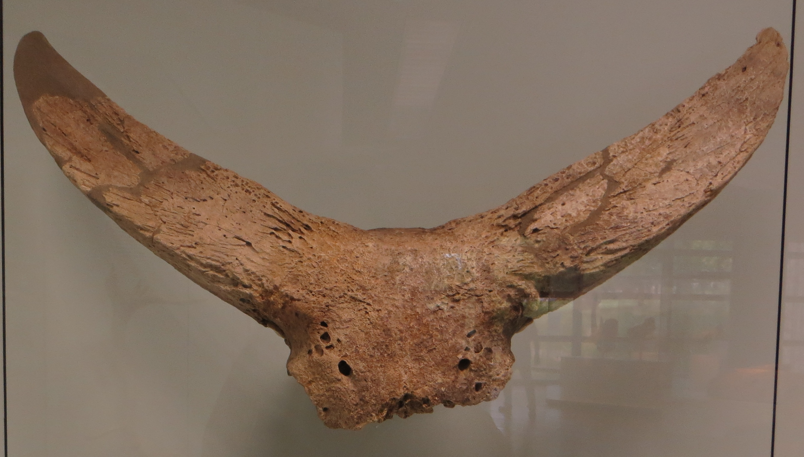 Fossil of Bubalus- Took the picture at Museum am Lowentor, Stuttgard